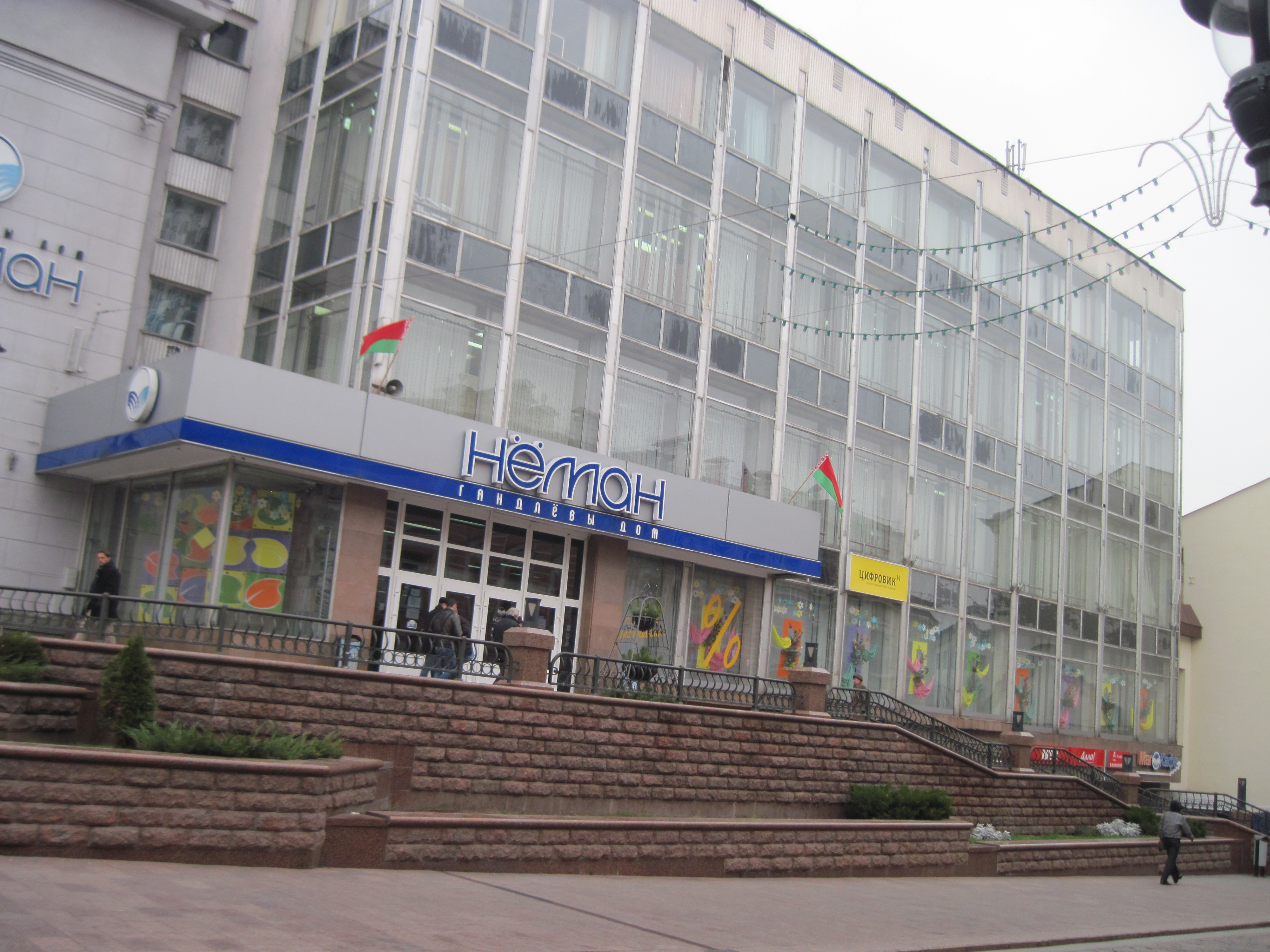 Беларуская (тарашкевіца): Будынак універмага , Гродна, вул. Савецкая, 18